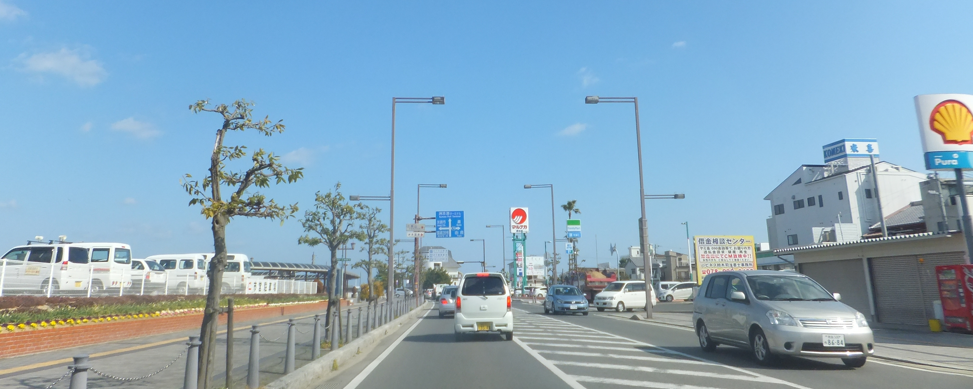 兵庫県洲本市港（左）、同栄町一丁目（右） 兵庫県道76号洲本灘賀集線